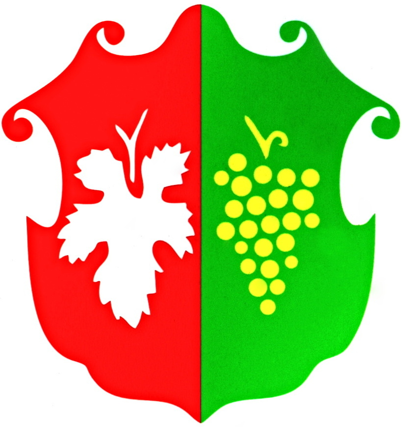 Kraví Hora znak